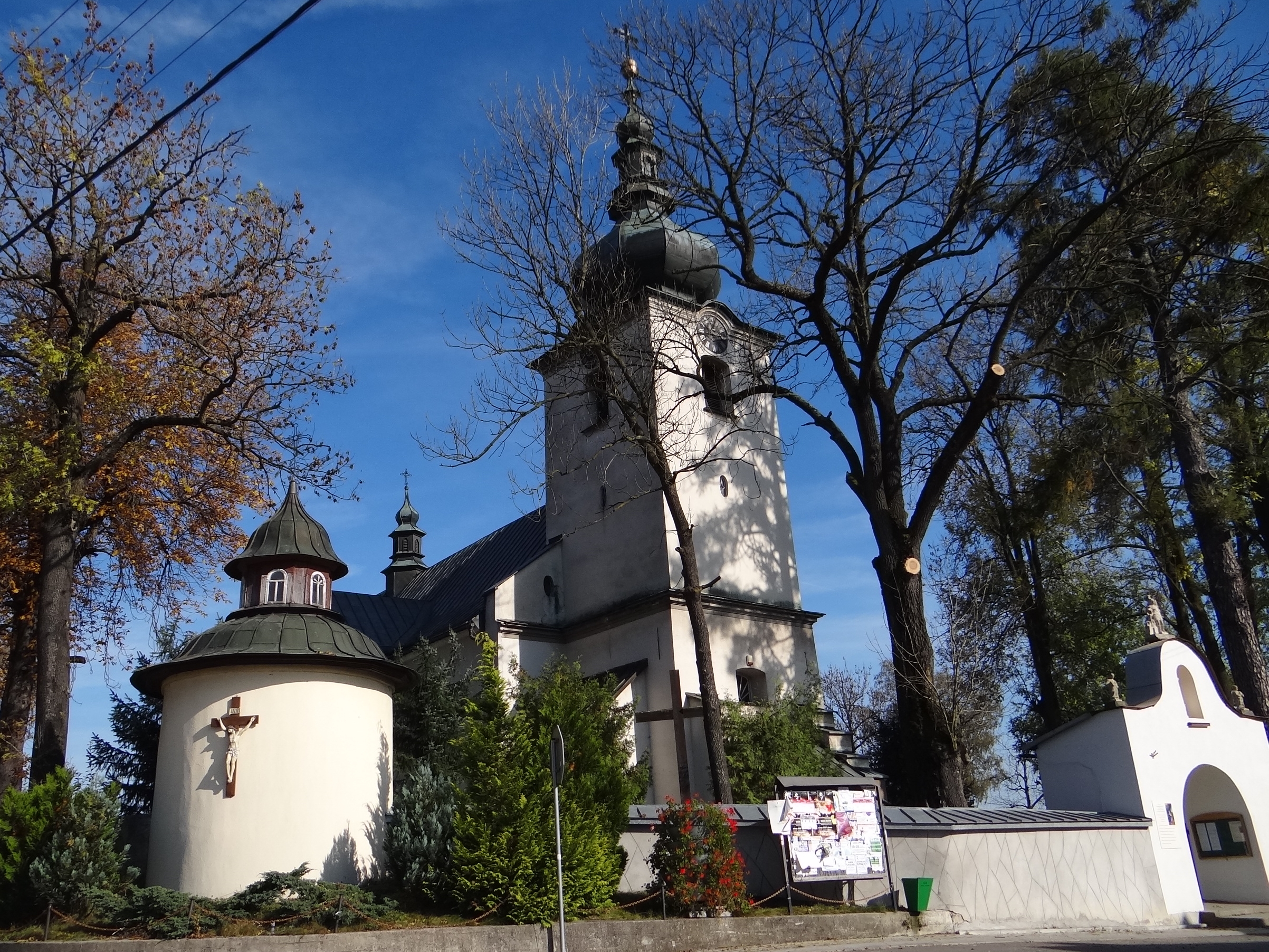 Odrowąż Podhalański 33 - kościół rzymskokatolicki pw. św. Marii Magdaleny, 1825-1831